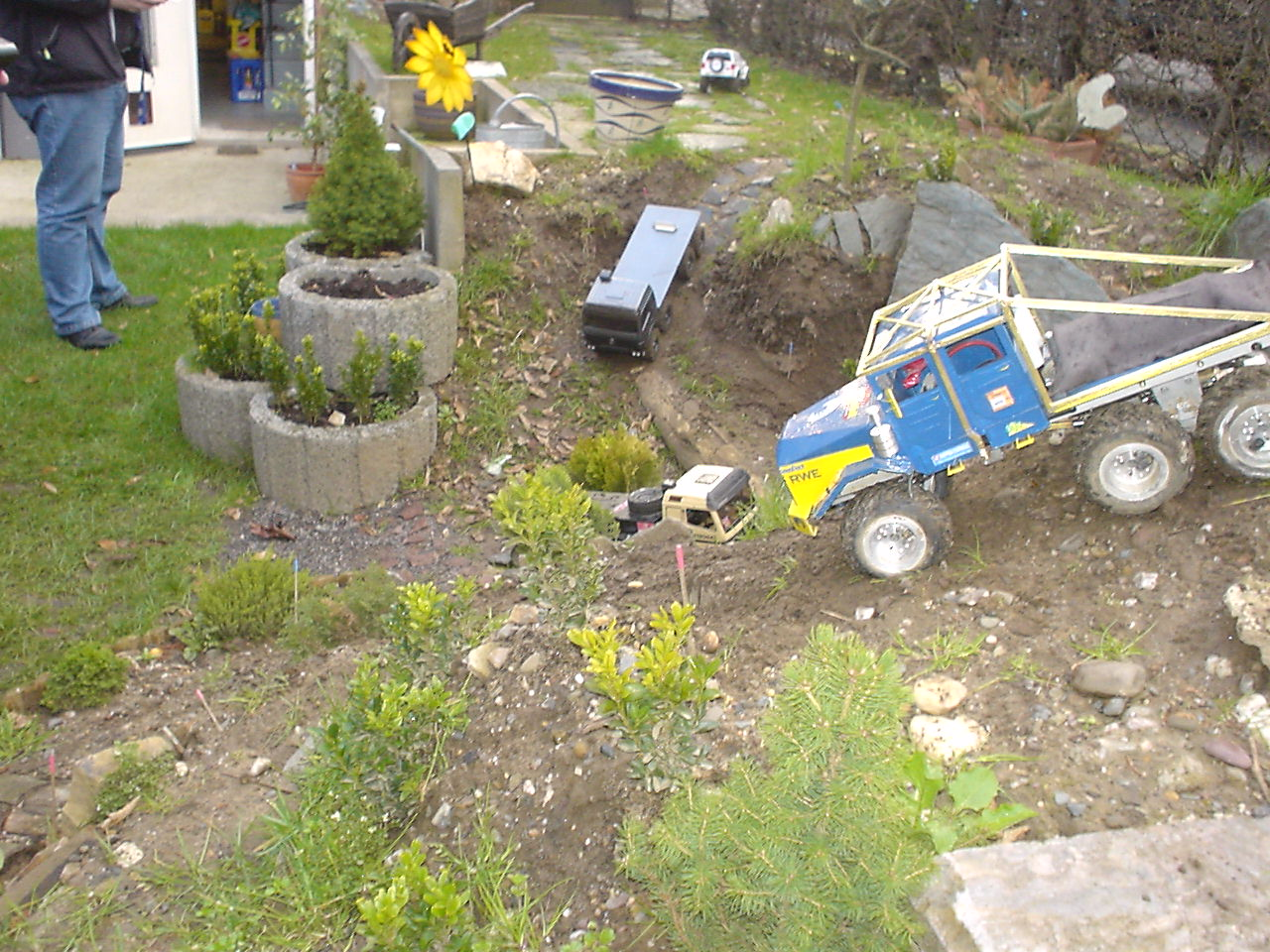 Modelltreffen in Köln